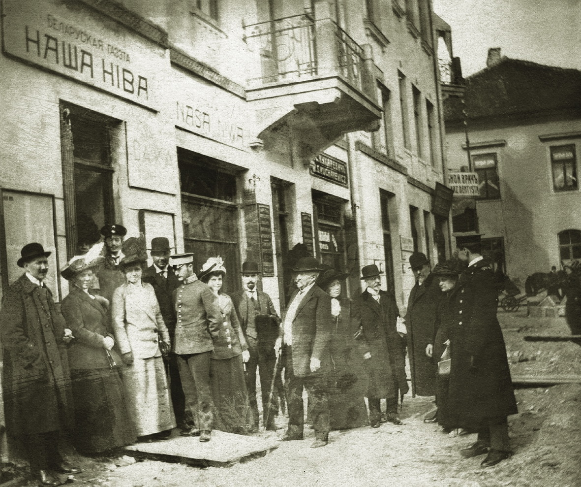 Беларуская (тарашкевіца): Вільня (Vilnia), вуліца Завальная (vulica Zavalnaja). Рэдакцыя газэты Наша Ніва.